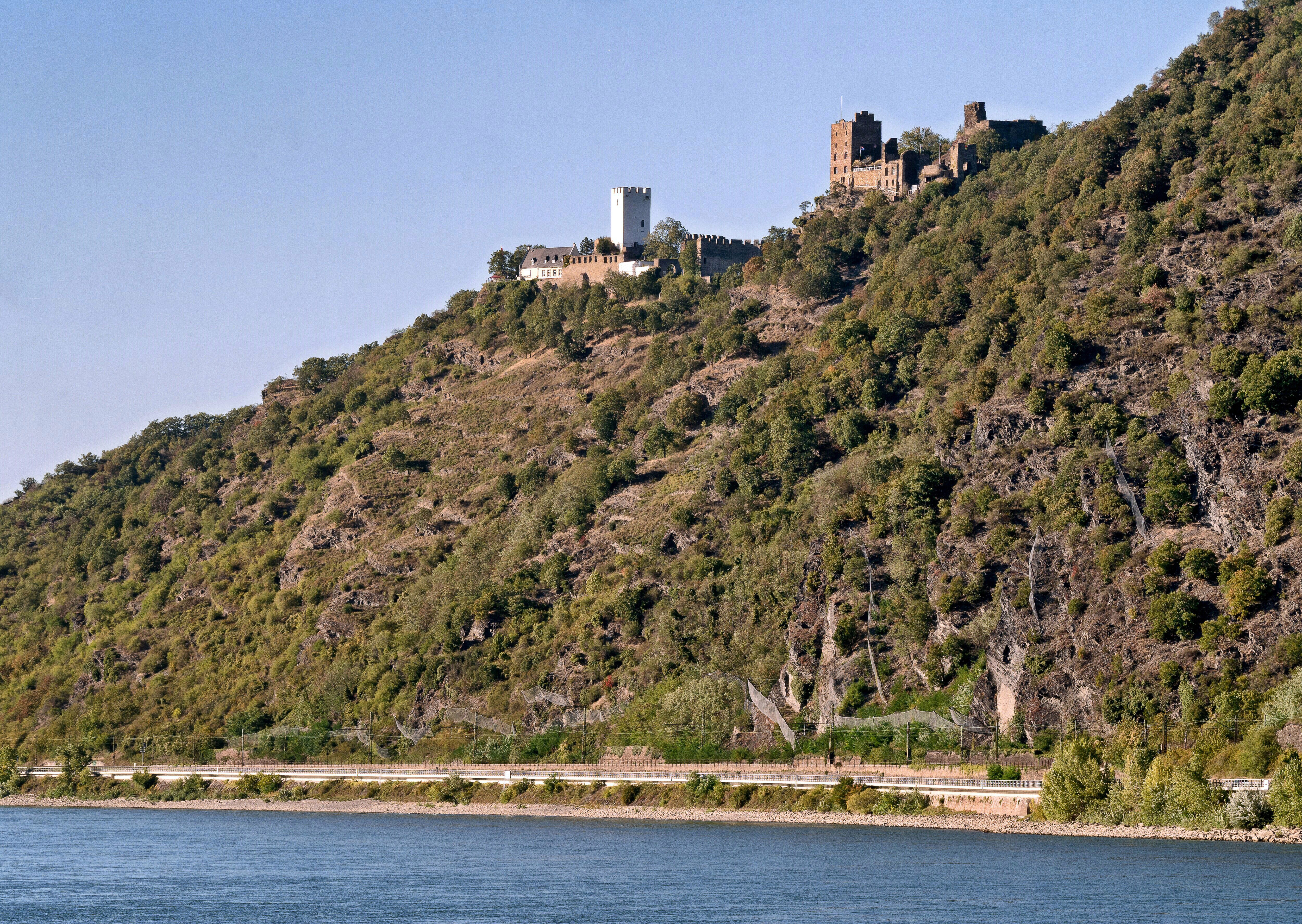 Rheinseite der Feindlichen Büder, links Burg Sterrenberg, rechts Burg Liebenstein.